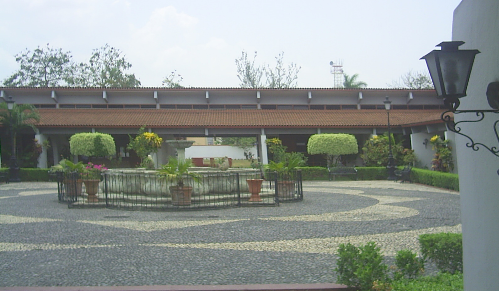 Patio central de la casa de la cultura Dr. Victor Bravo Ahuja de Tuxtepec, Oax.